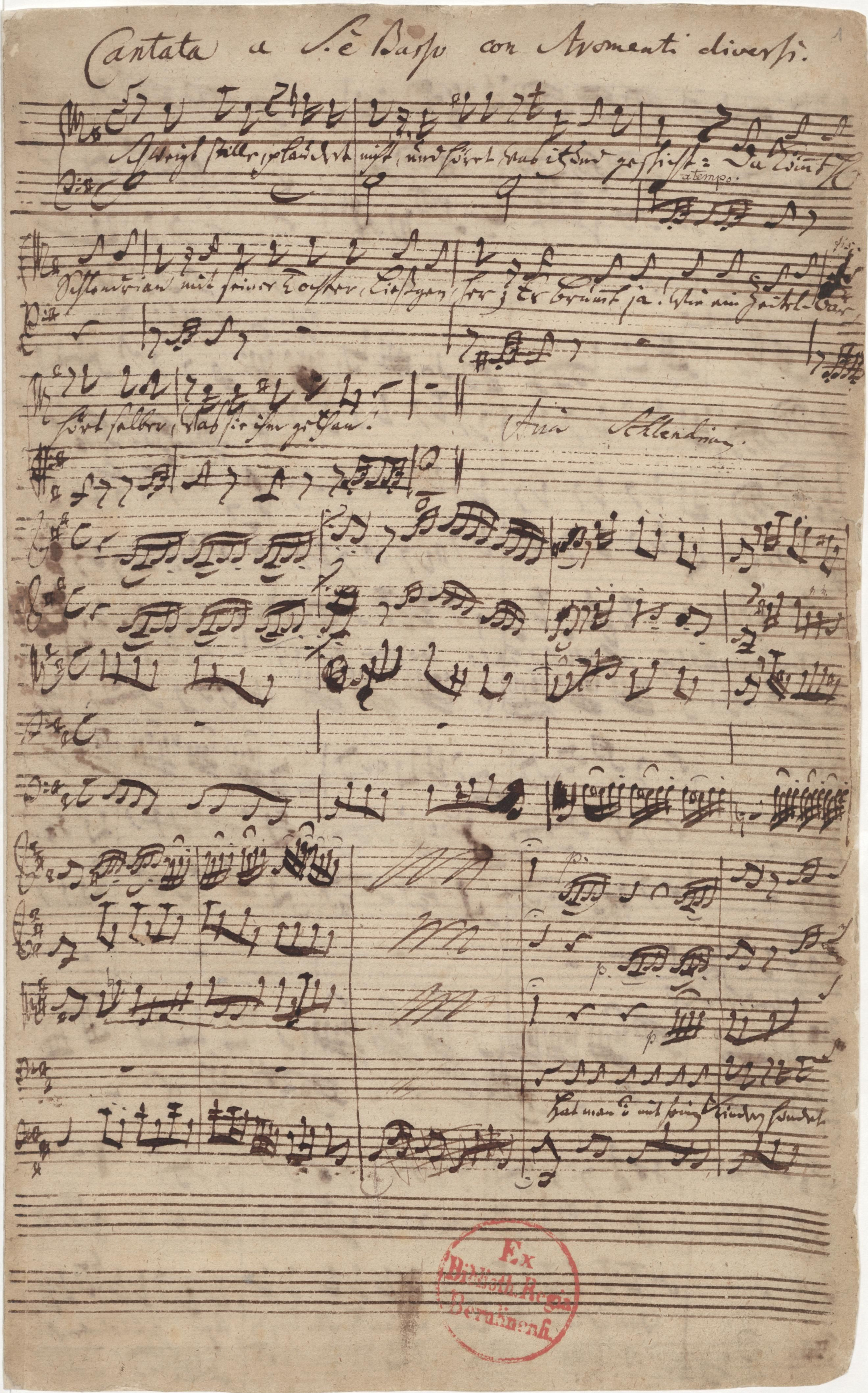 Autograph Kantate BWV 211 (erste Seite, insgesamt 12 Blätter)